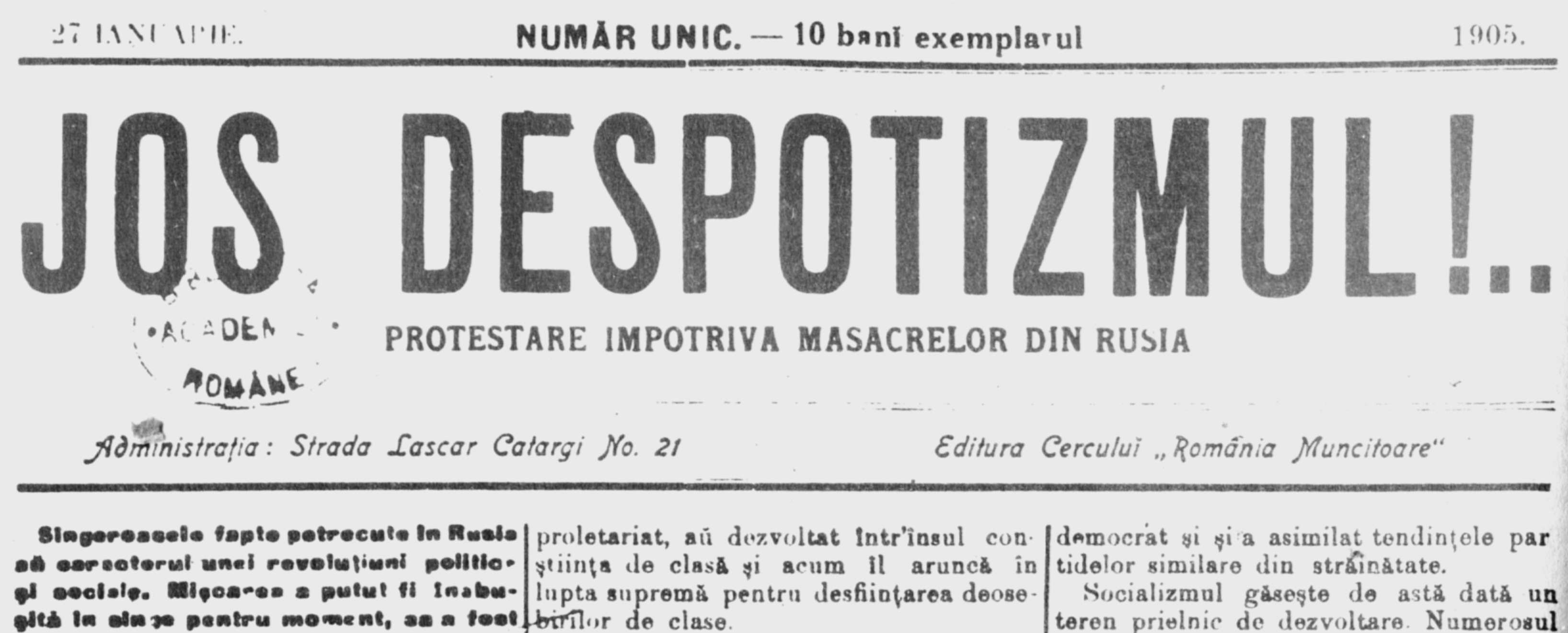 Cover of Jos Despotizmul!.., a special issue of România Muncitoare